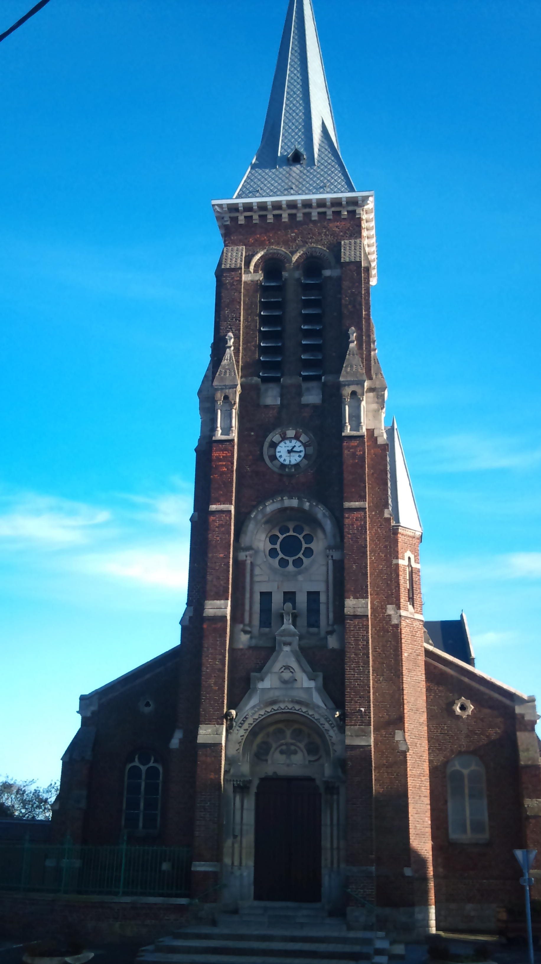 Dechy - Église